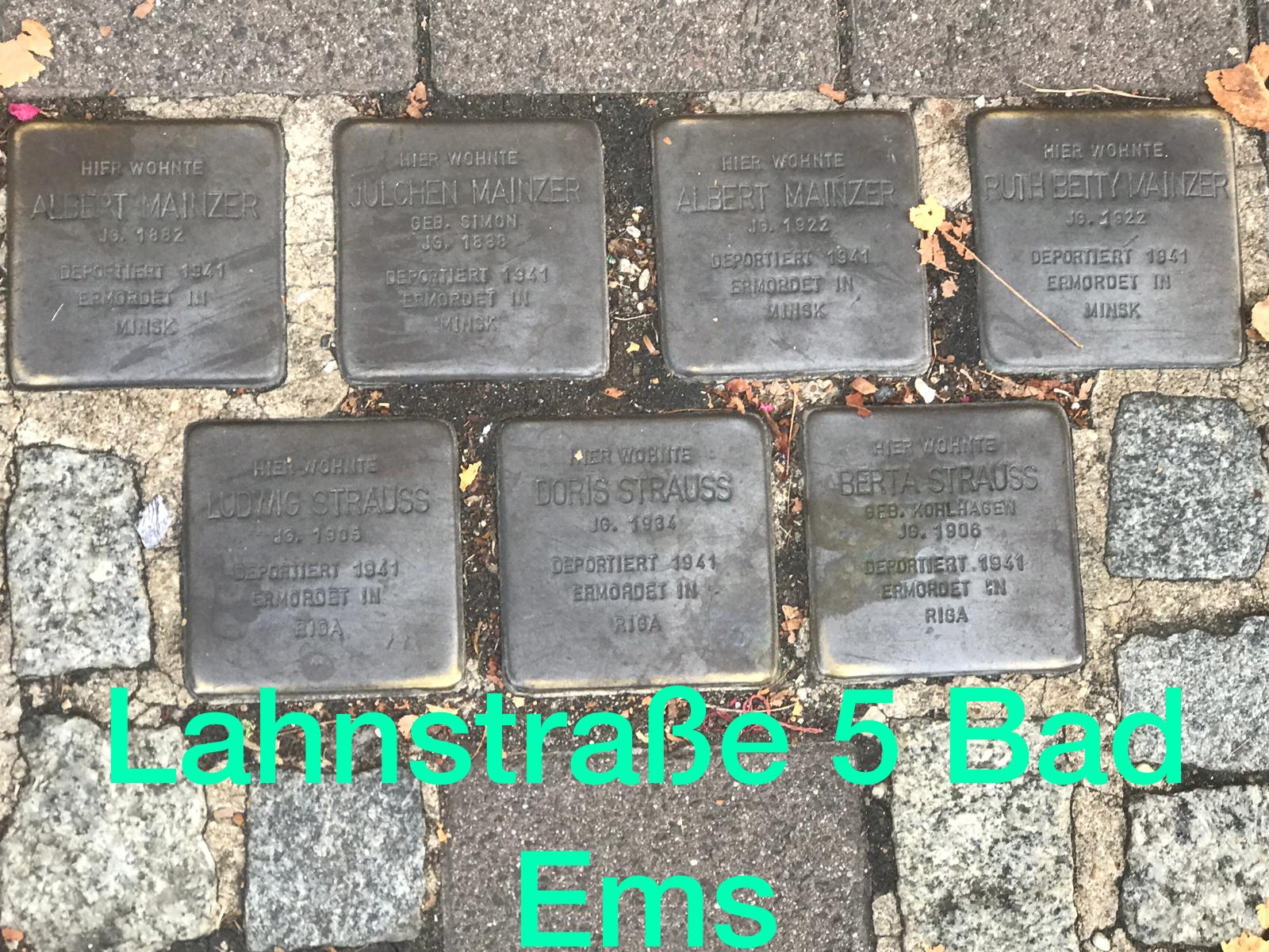 Stolperstein Lahnstraße 5 Bad Ems